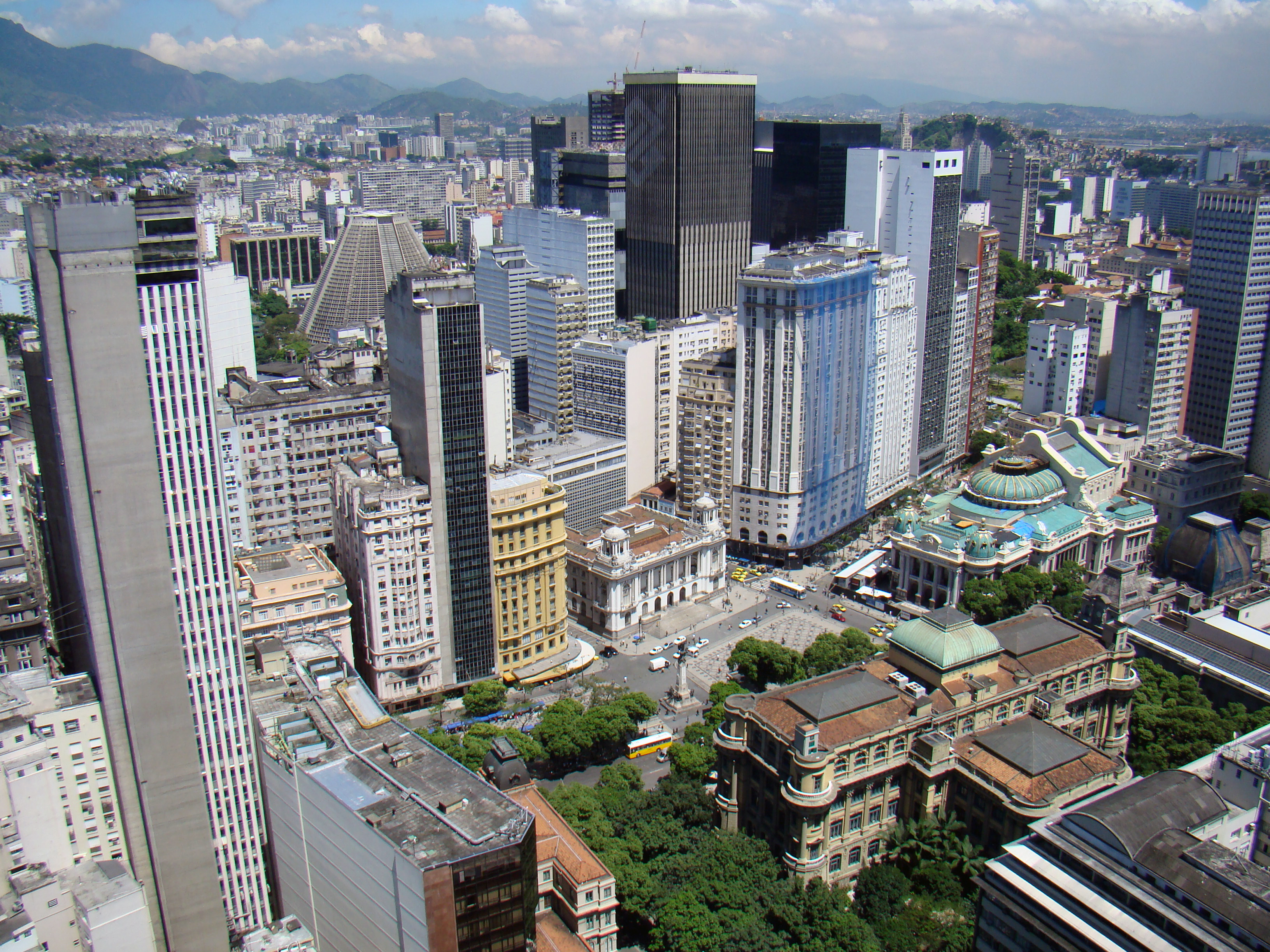 O Centro é um bairro da Região Central da cidade do Rio de Janeiro